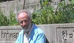 Jonathan Pool en publika parko en Seatlo, Vaŝintonio, Usono.